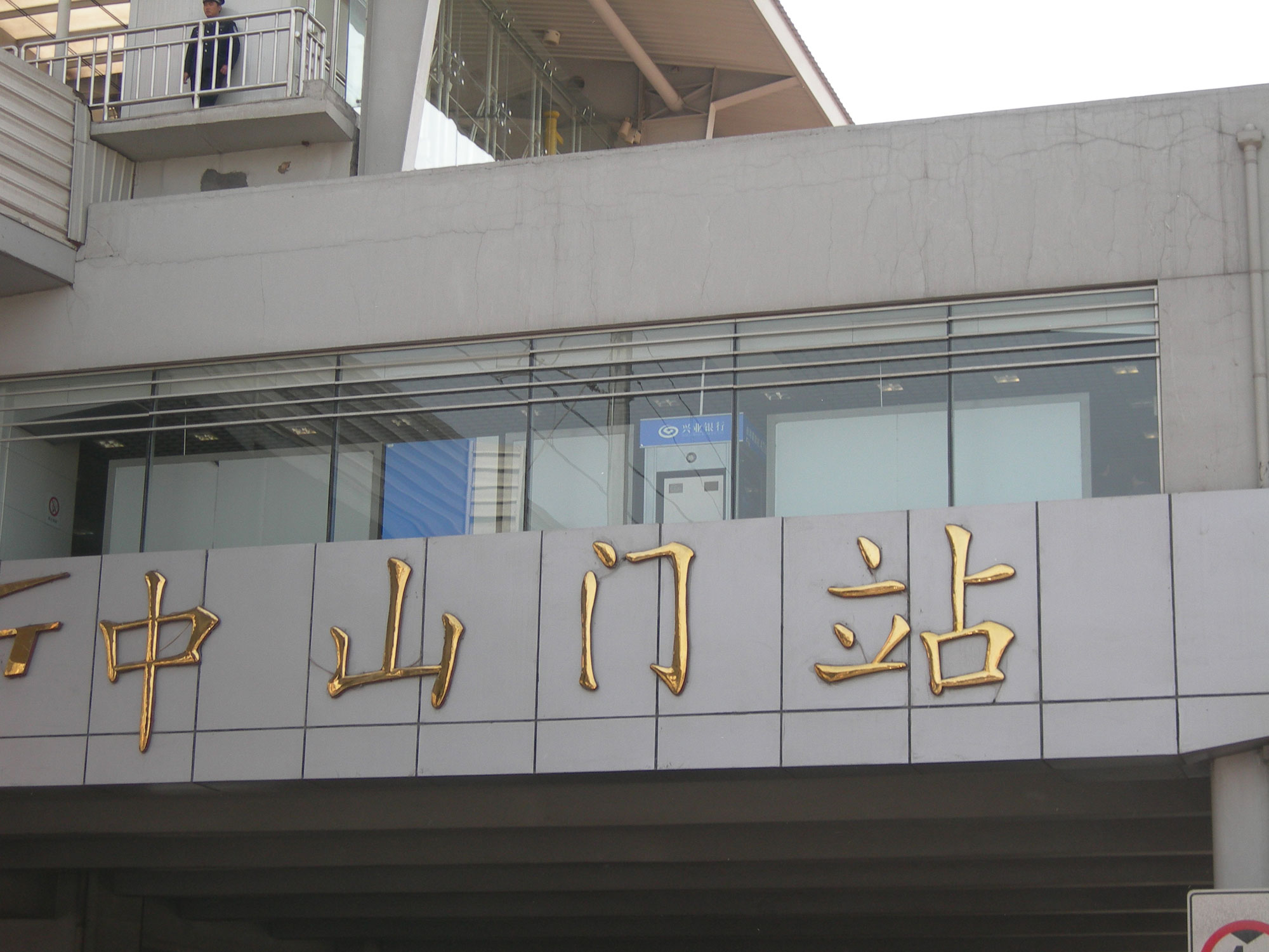 中山门站